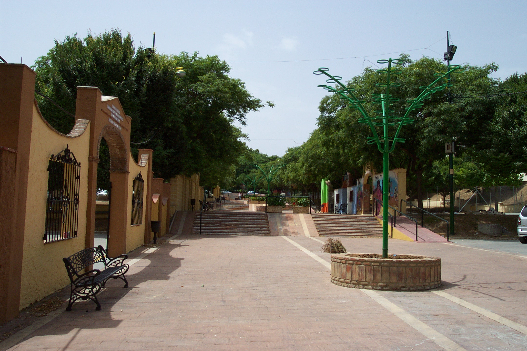 Alhaurín de la Torre, Spain.